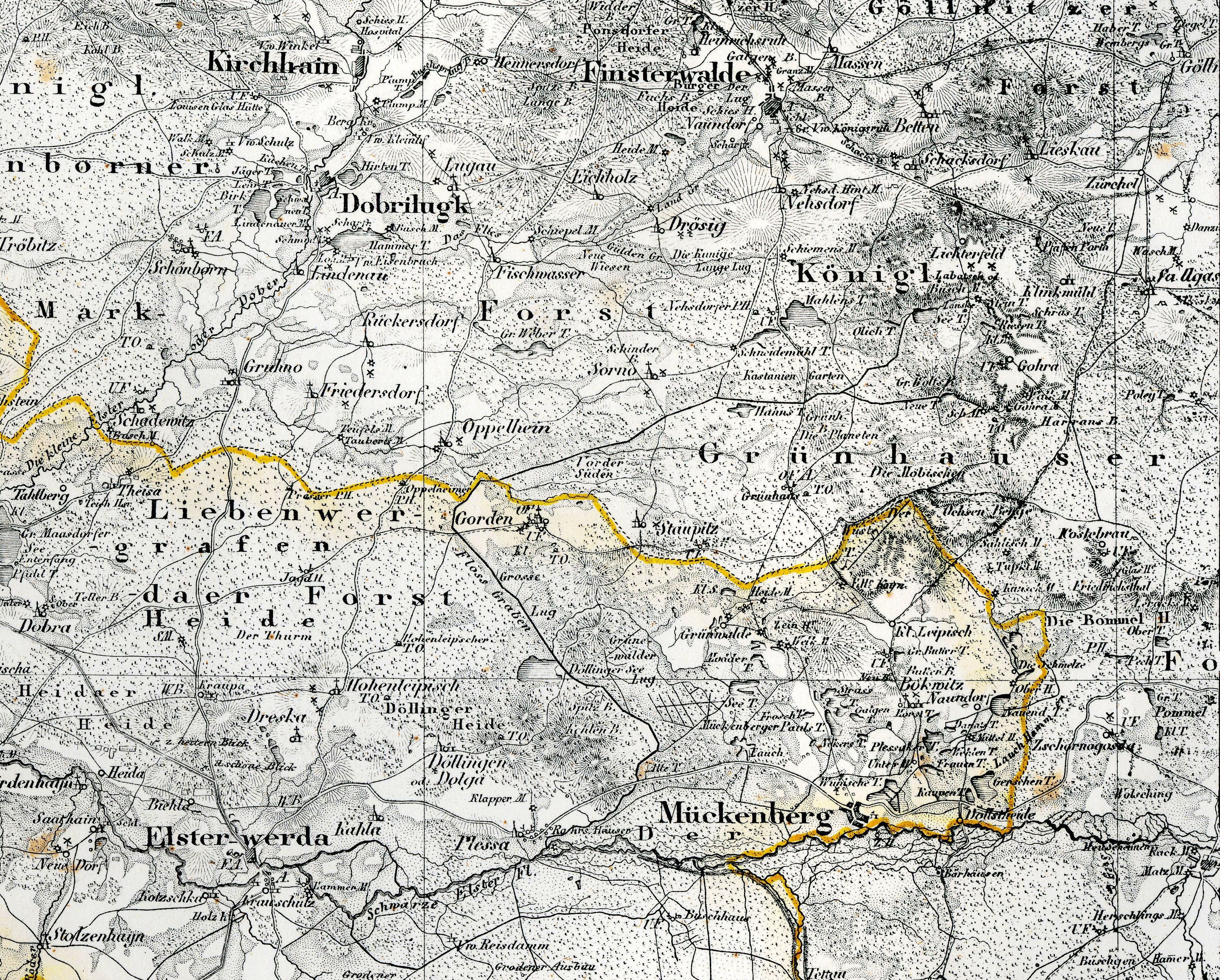 Verlauf des Floßgrabens